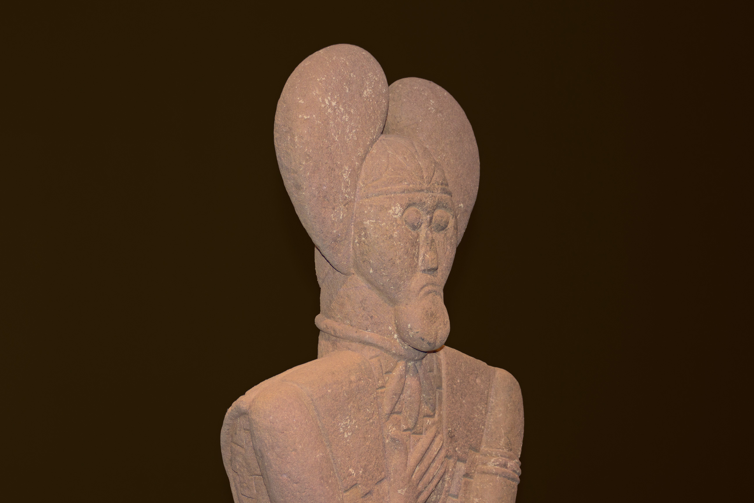 Keltenfürst Glauberg im der Keltenwelt am Glauberg.